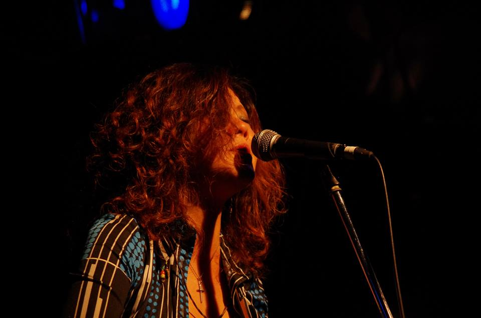 Tammy